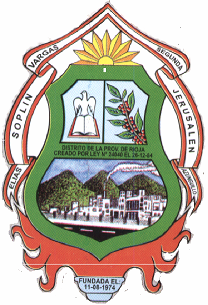 Escudo Elias Soplin Vargas